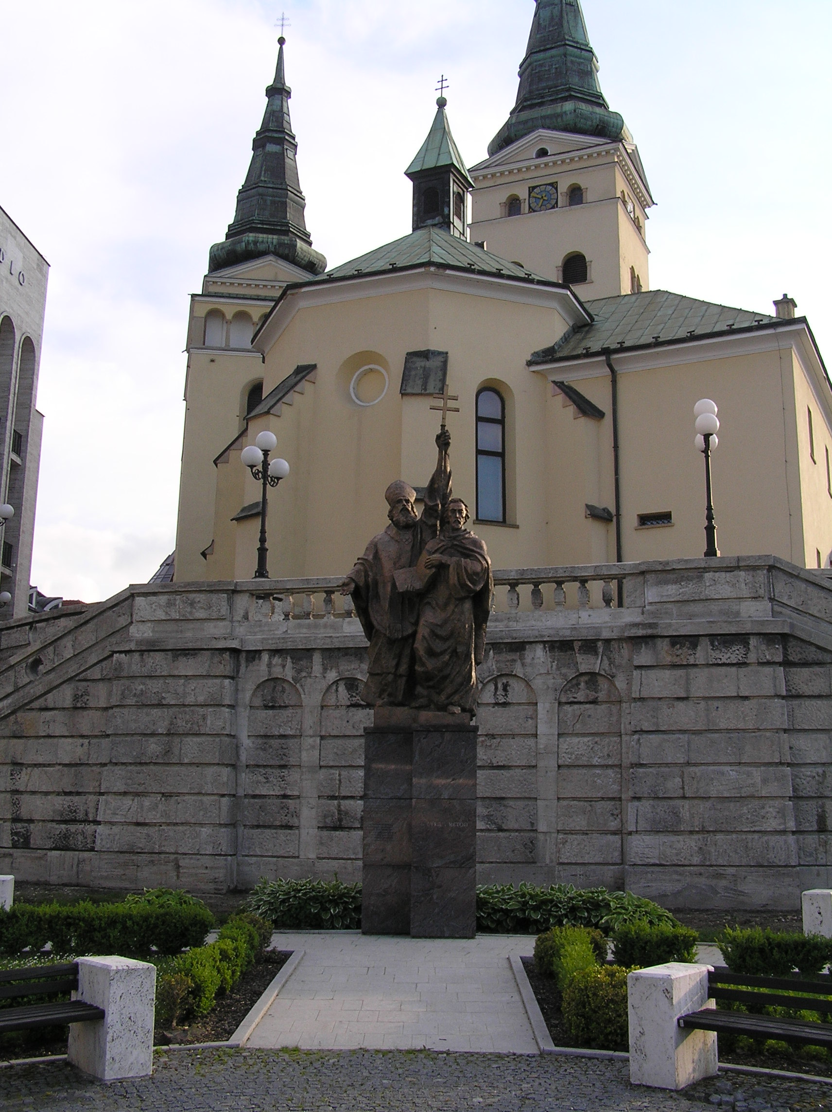 Súsošie Cyrila a Metoda na popredí kostola Najsvätejšej Trojice Námestie Andreja Hlinku, Žilina This medium shows the protected monument with the number 511-1393/1 in the Slovak Republic.